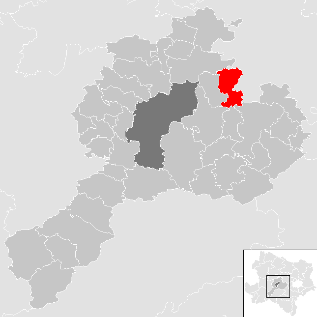 Bezirk St. Pölten-Land